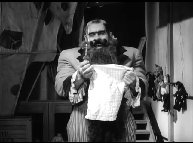 Актёр Александр Щагин в роли Карабаса-Барабаса в фильме "Золотой ключик" (1939)